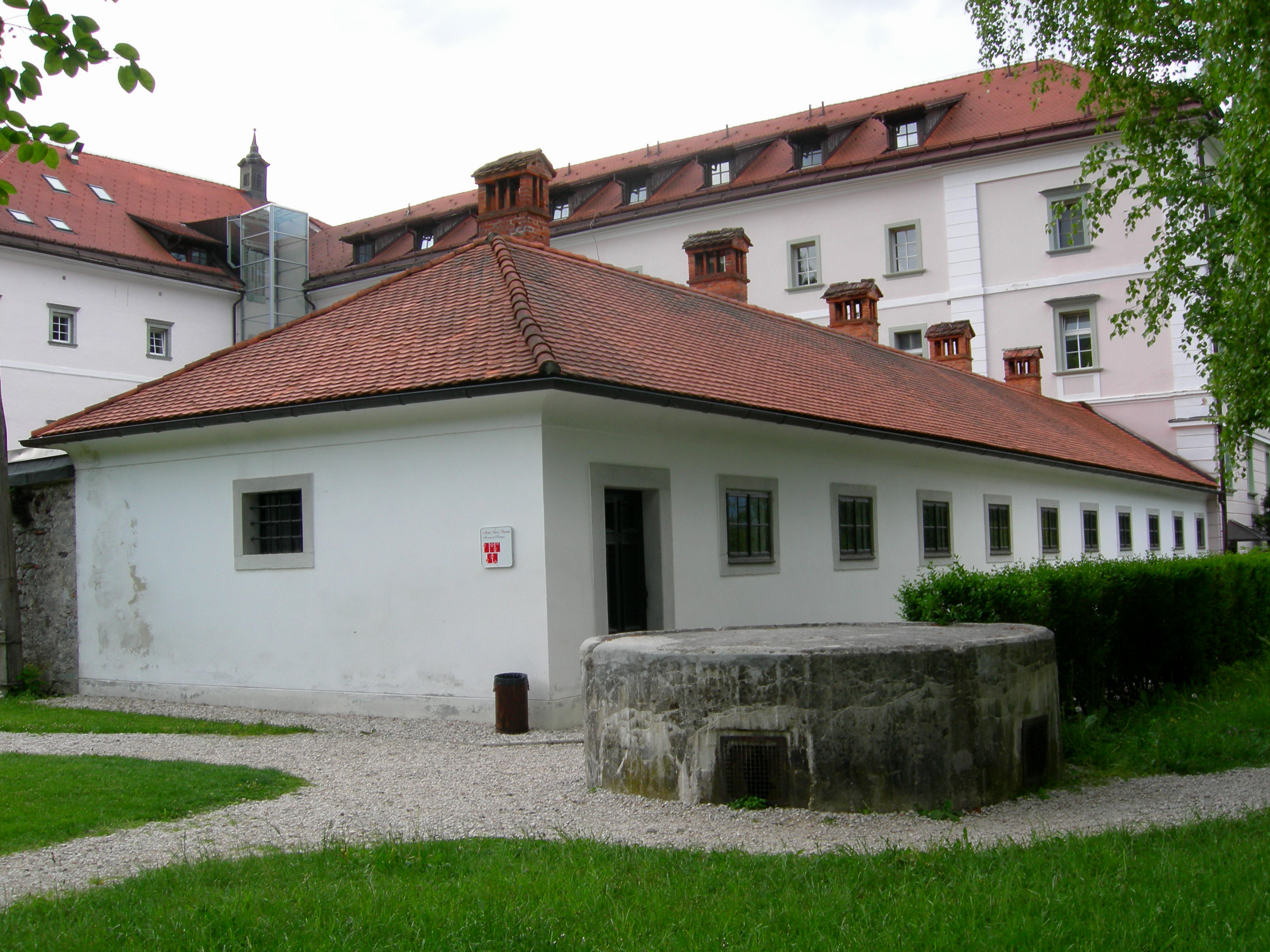 Muzej talcev - grad Kacenštajn, Begunje na Gorenjskem, Slovenia